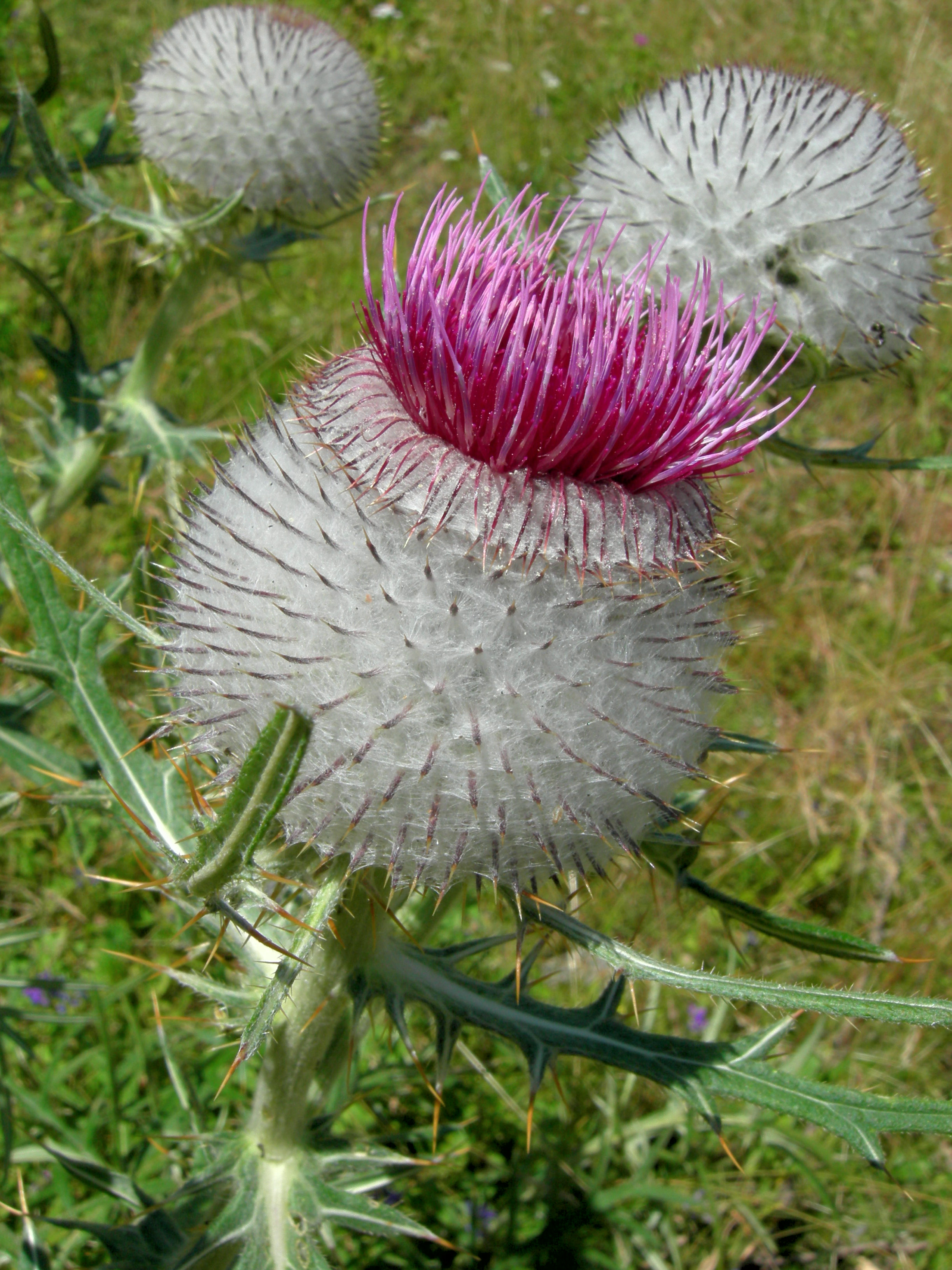 Cirsium eriophorum, Preval (under Begunjscica) at 1300m, Slovenia